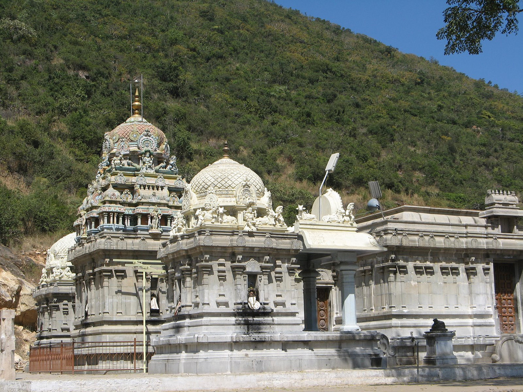 Marudamalai Temple